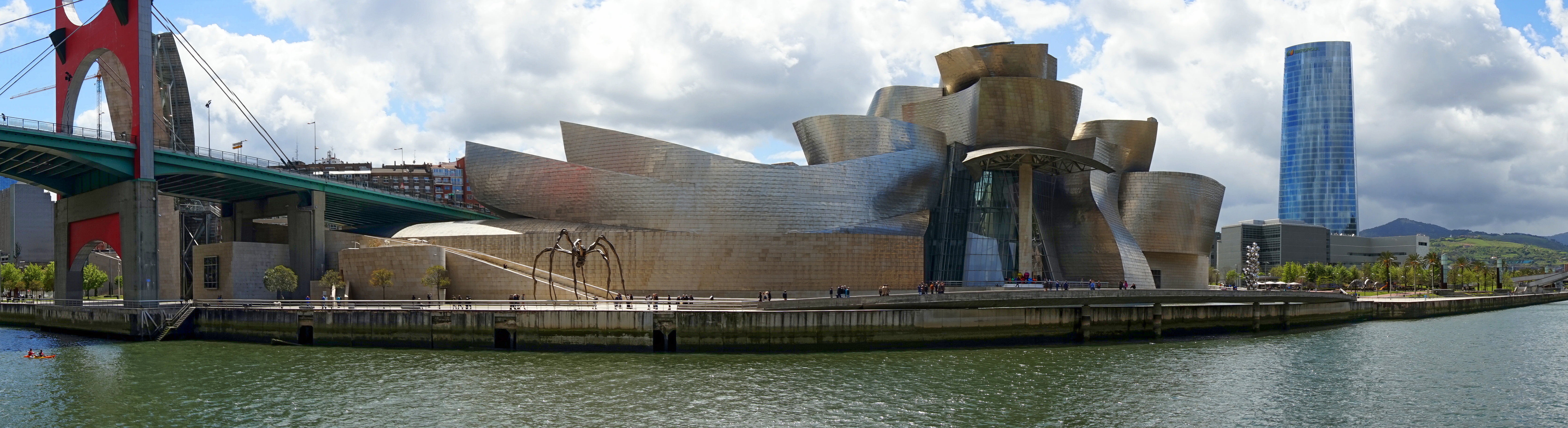 Guggenheim Museum Panorama, Bilbao